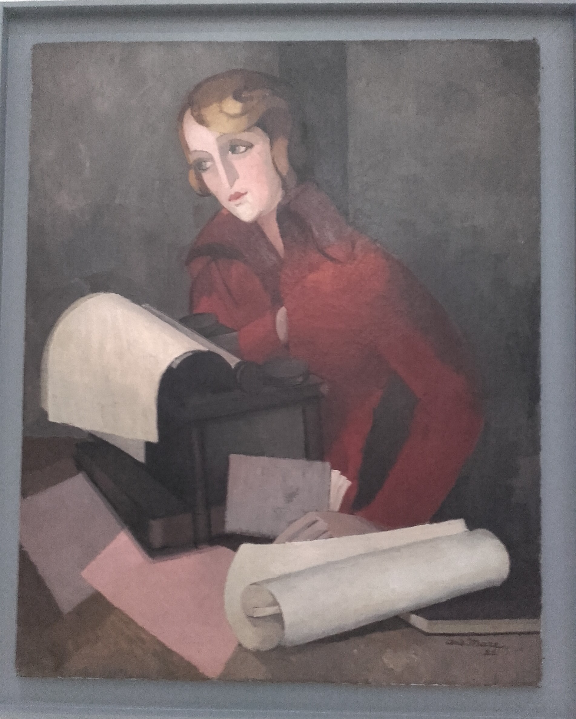 Musée des Beaux-Arts de Bernay André Mare, Portrait de mademoiselle Demeige, secrétaire de la Compagnie des Arts français, 1922